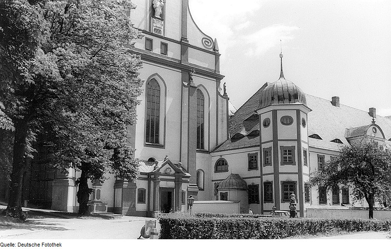 Original image description from the Deutsche Fotothek Panschwitz-Kuckau-Kuckau. Kloster St. Marienstern, Kirche